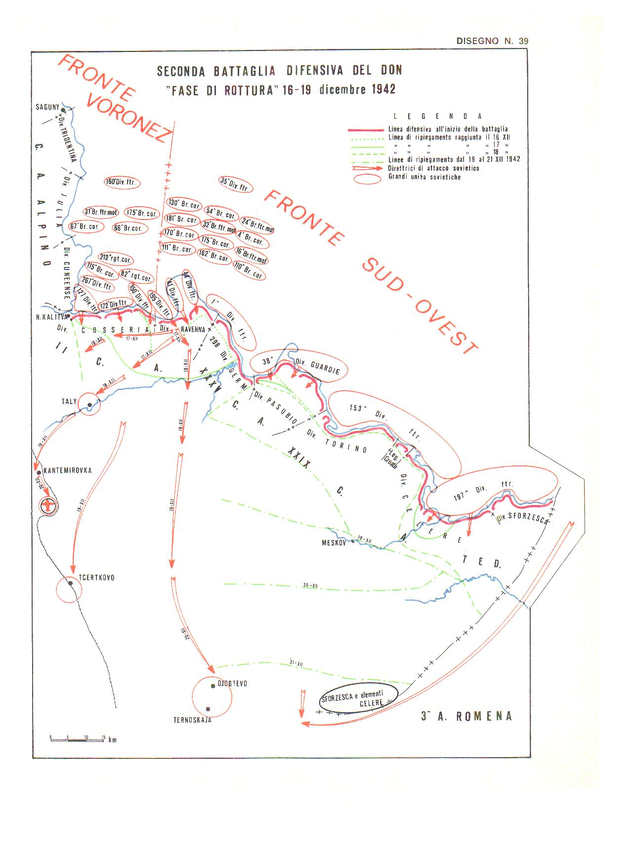 Unità e direttrici sovietiche durante l'attacco decisivo contro le posizioni italo-tedesche sul Don in seno all'operazione Piccolo Saturno